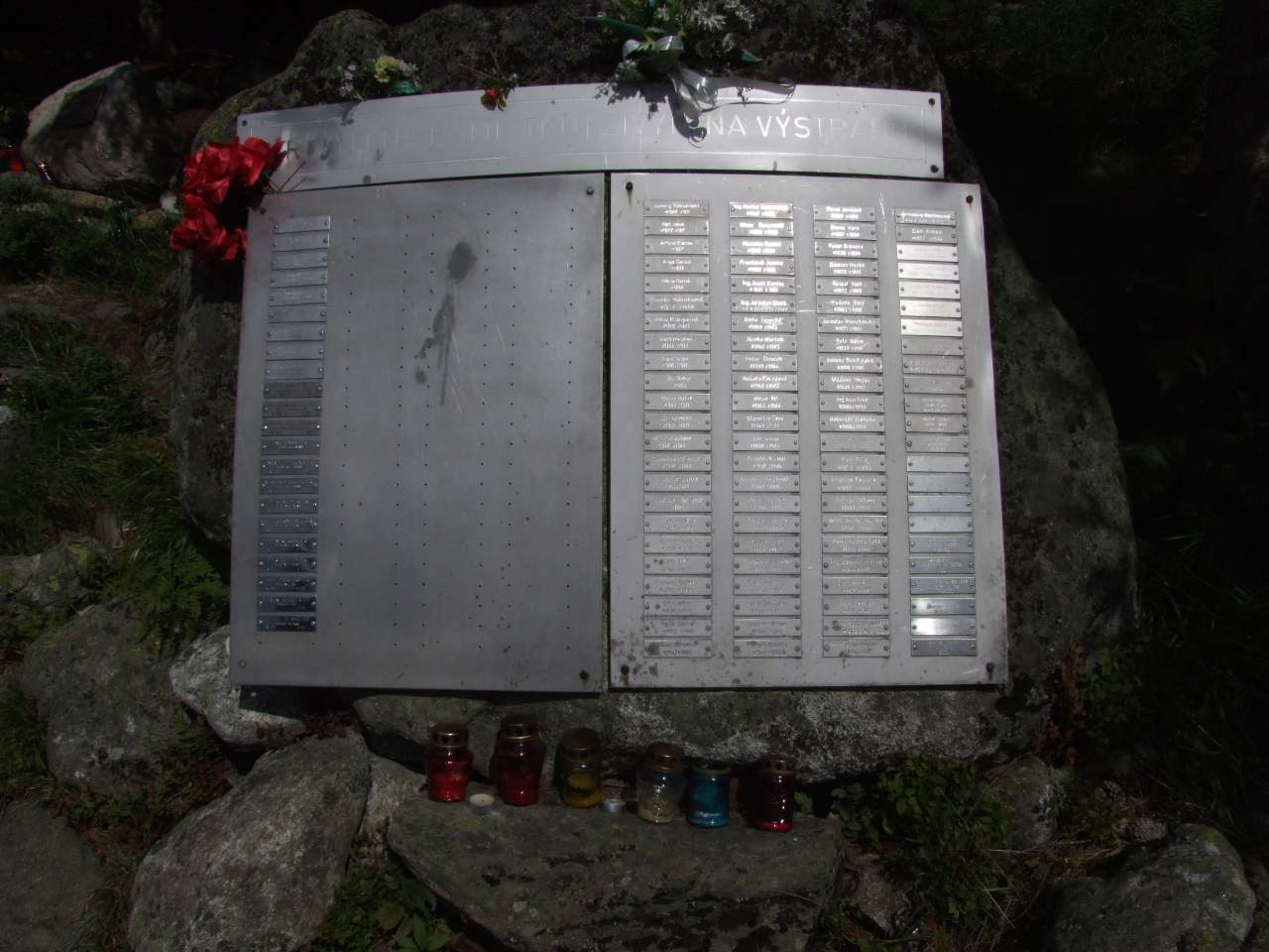 Symboliczny cmentarz ofiar Tatr Zachodnich przy Żarskim Schronisku